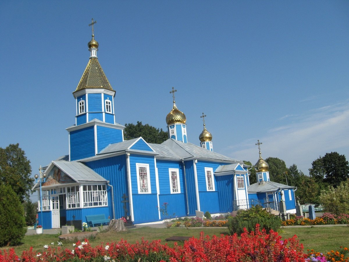 Кобрын. Петрапаўлаўская царква